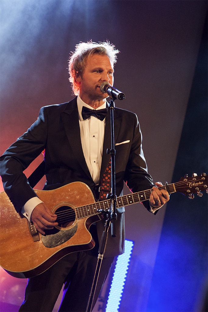 Sångaren och gitarristen Stefan Andersson.